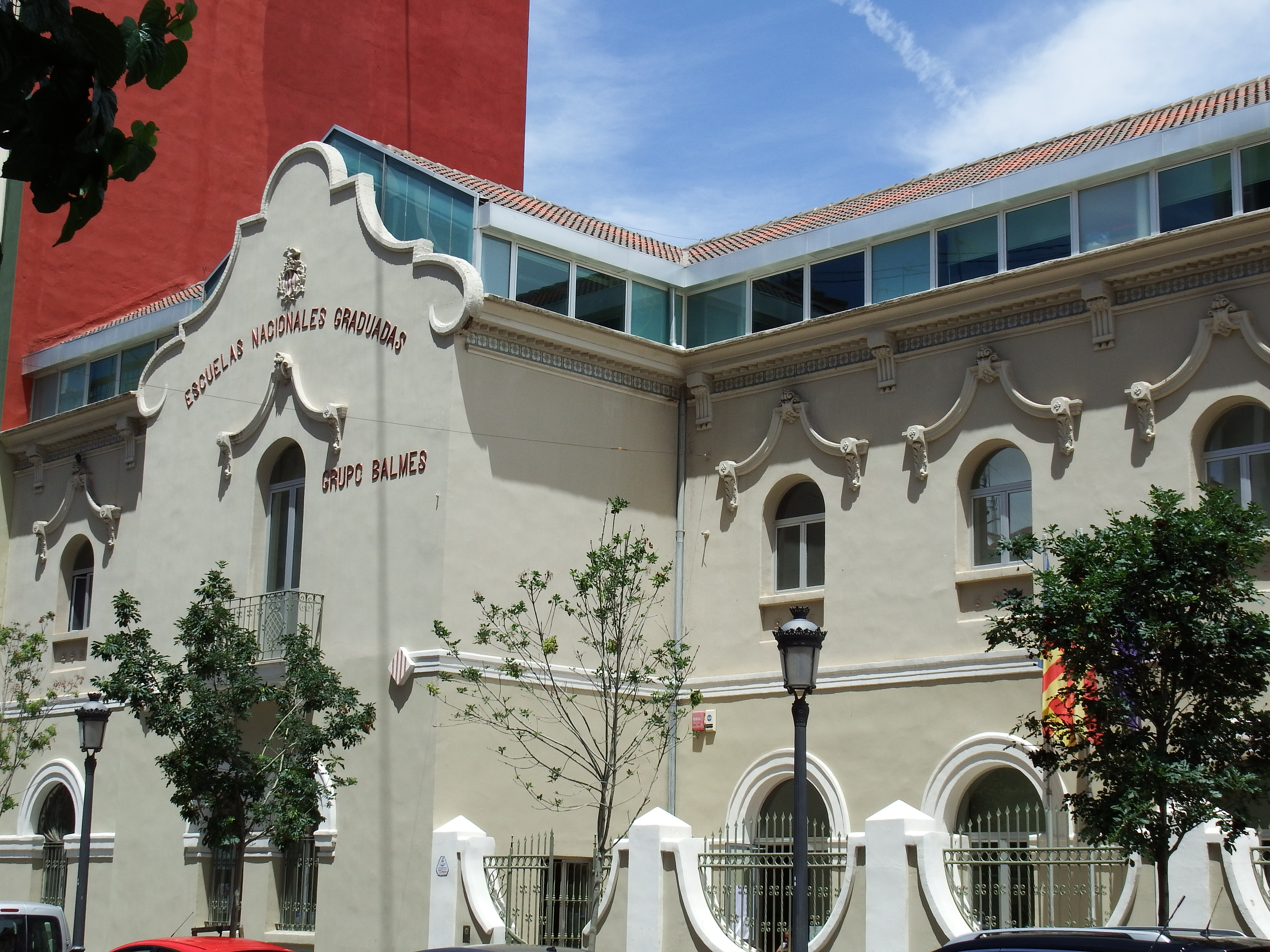 Vista fachada principal del Grupo escolar Balmes.